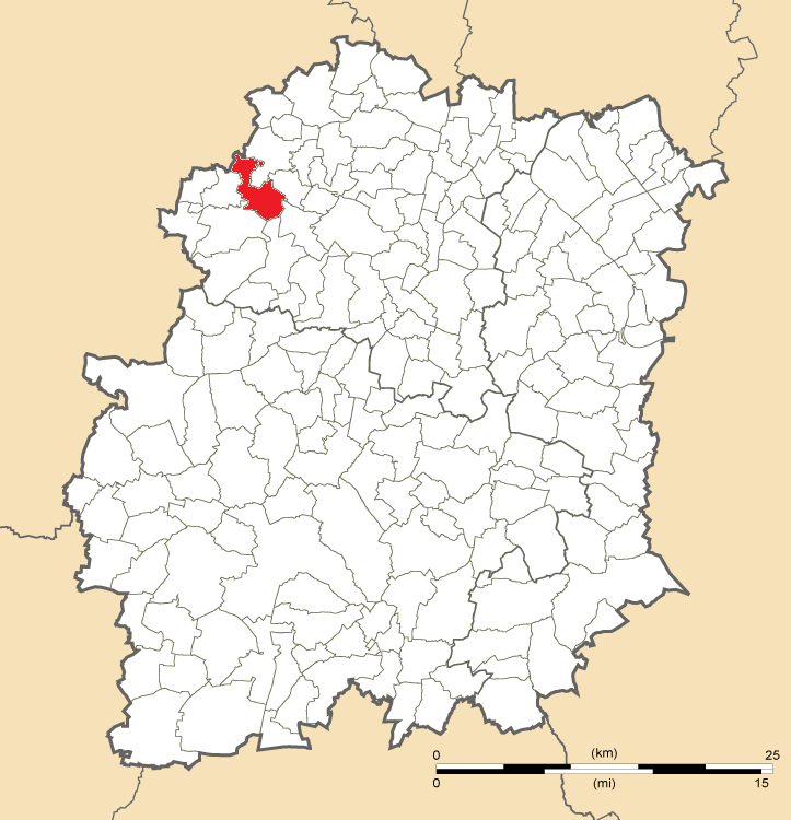 Carte de position de Gometz-la-Ville en Essonne (91)